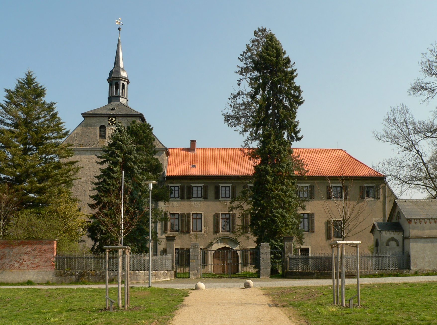 Einfahrt des Rittergut Lucklum